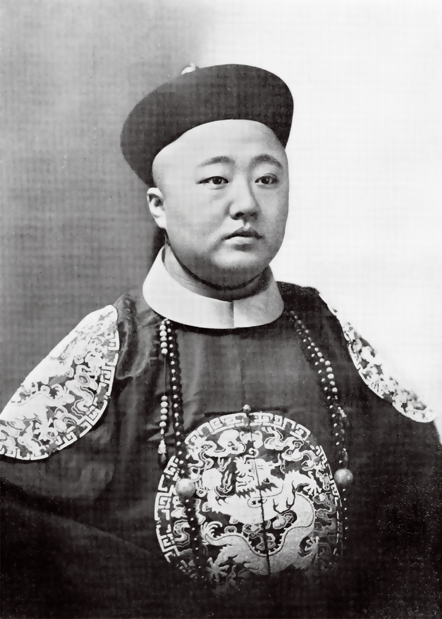 載洵